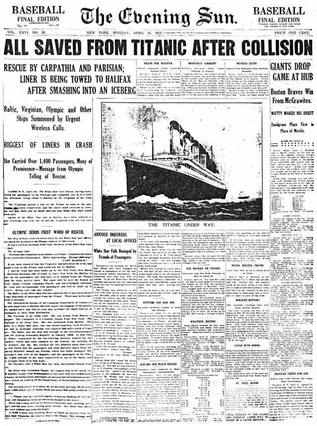 Titres des journaux de l'Evening Sun le 15 avril 1912